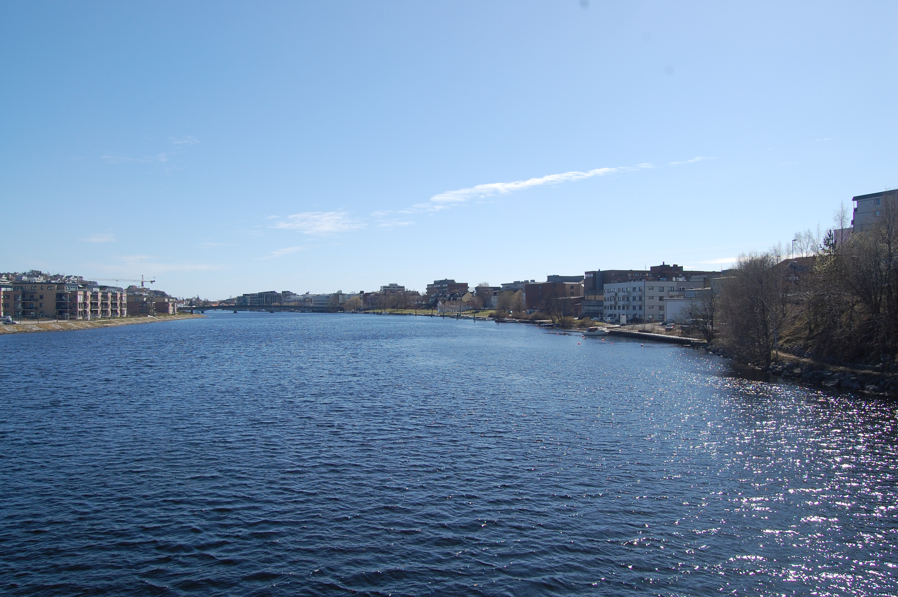 Otra mellom Lundsbroa og Oddernesbrua i Kristiansand